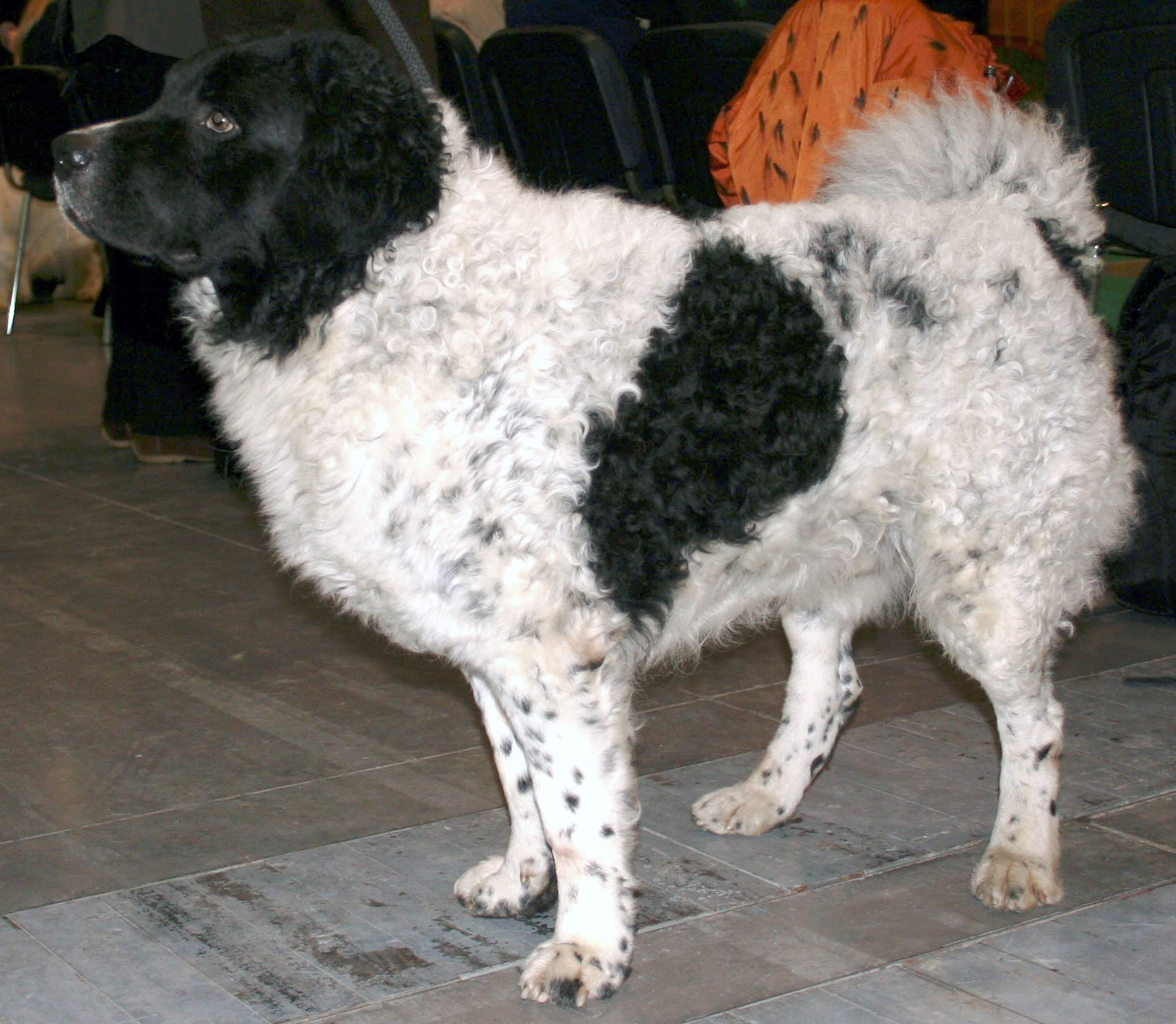 Fryzyjski_pies_wodny na Światowej Wystawie Psów Rasowych w Poznaniu